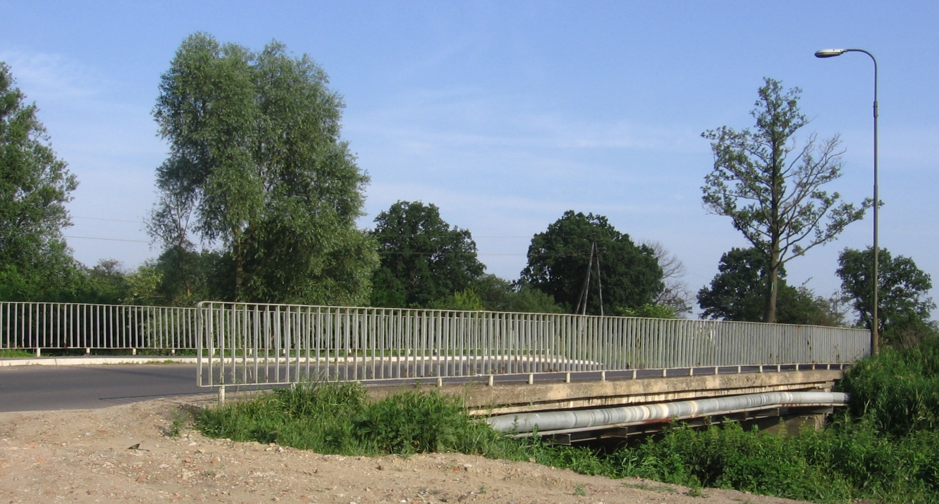 Kłokoczycki bridge over Dobra River in Wrocław, Poland